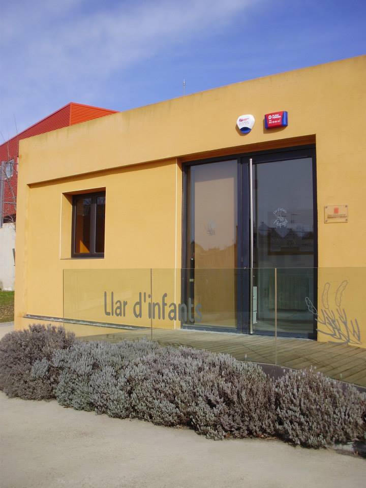 Vista entrada